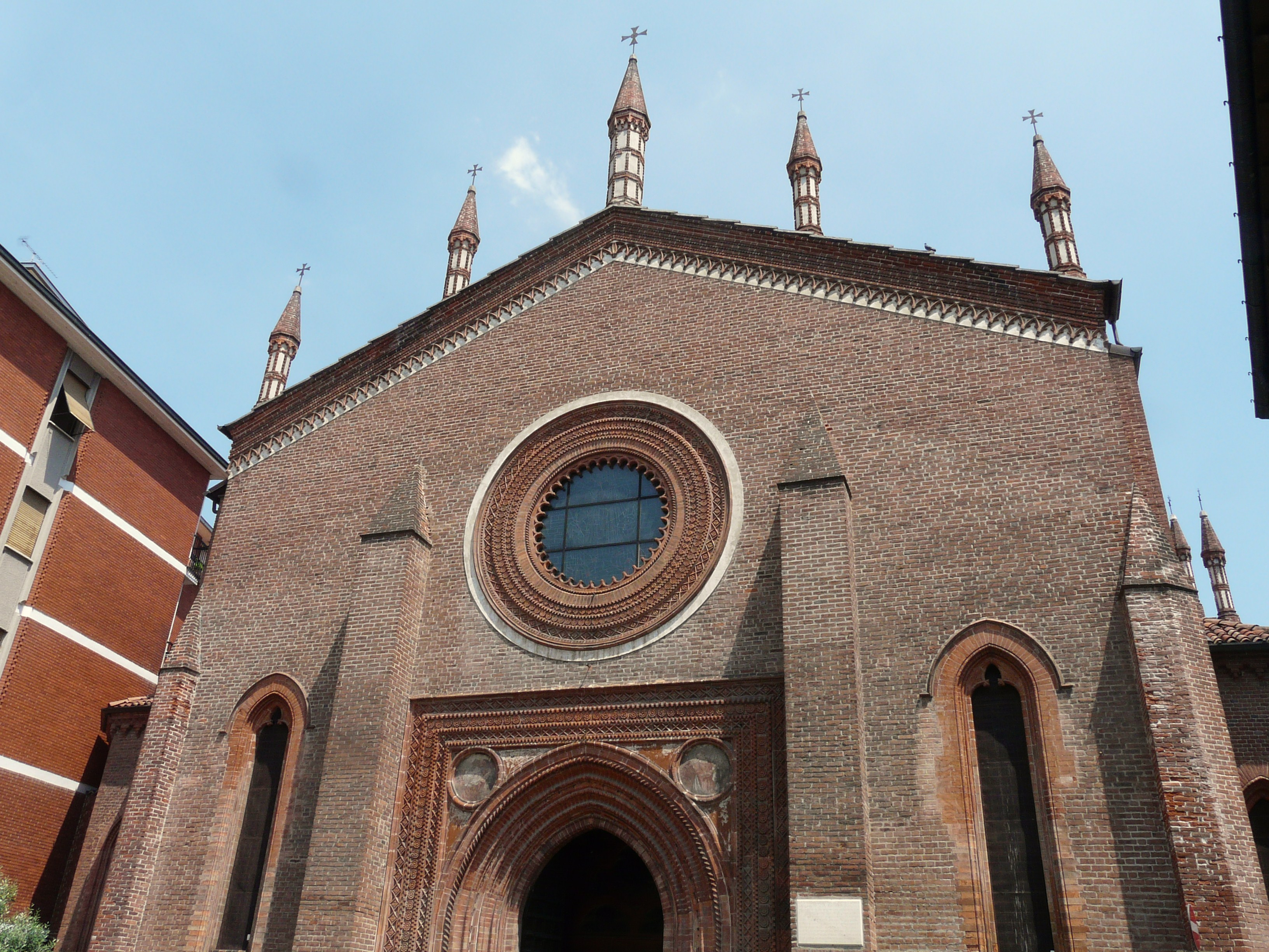 Chiesa di San Francesco, Vigevano, Lombardia, Italia